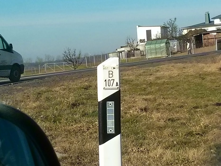 Leitpfosten mit Stationszeichen auf der B107A (Ortsumgehung Grimma)